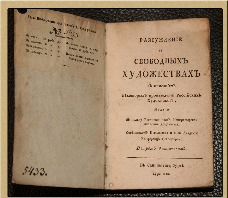 Пëтр Петрович Чекалевский (1751—1817). "Рассуждение о свободных художествах, с описанием некоторых произведений российских художников" (СПб., 1792)